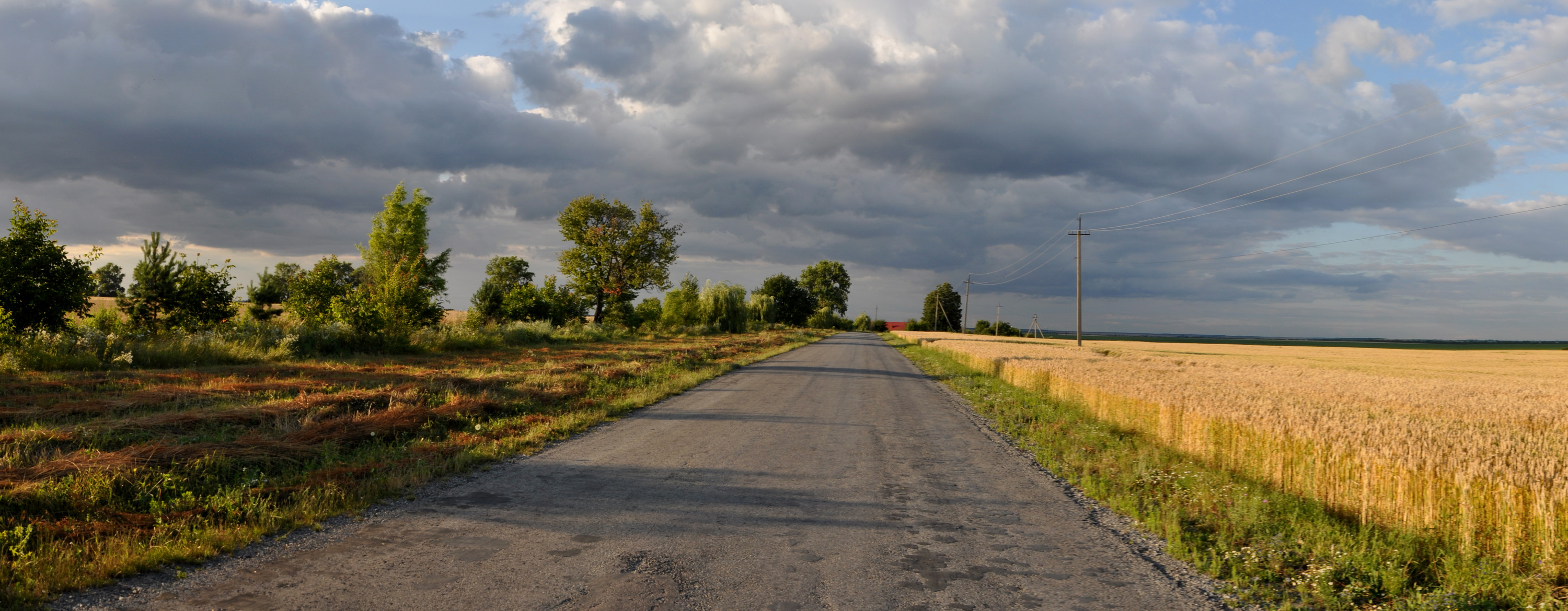 Дорога в село Шманьківці Чортківського району Тернопільської області України.